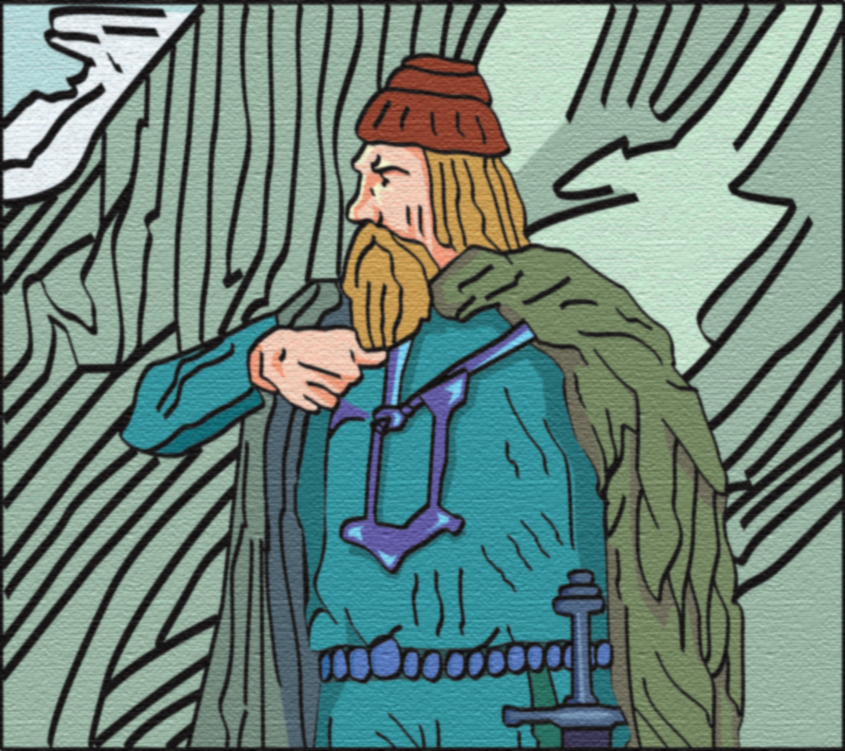 Portrett av Tore Hund